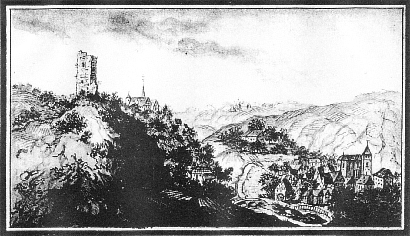 Die Ruine der Burg Jagstberg über Mulfingen